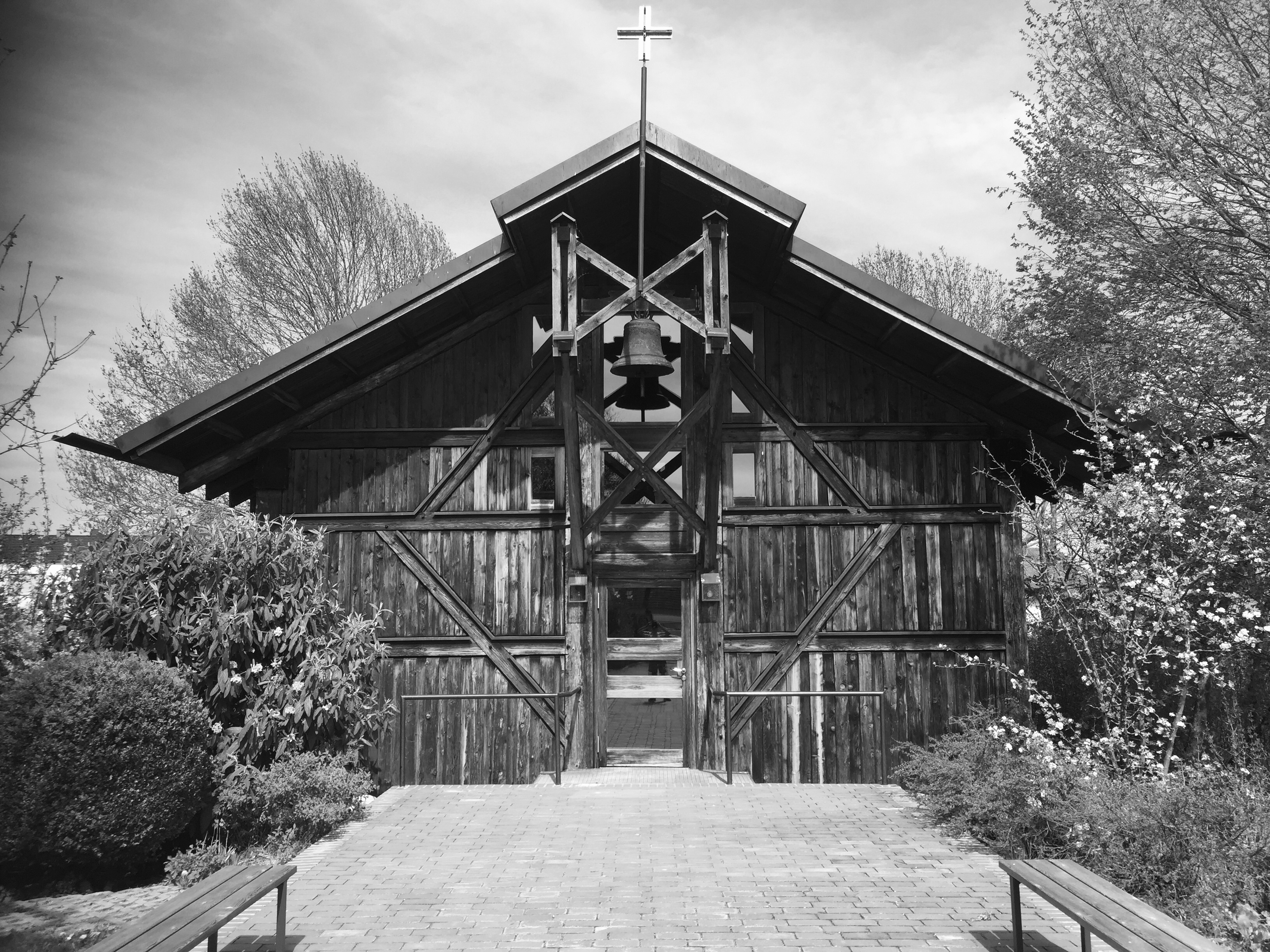 Holzbau